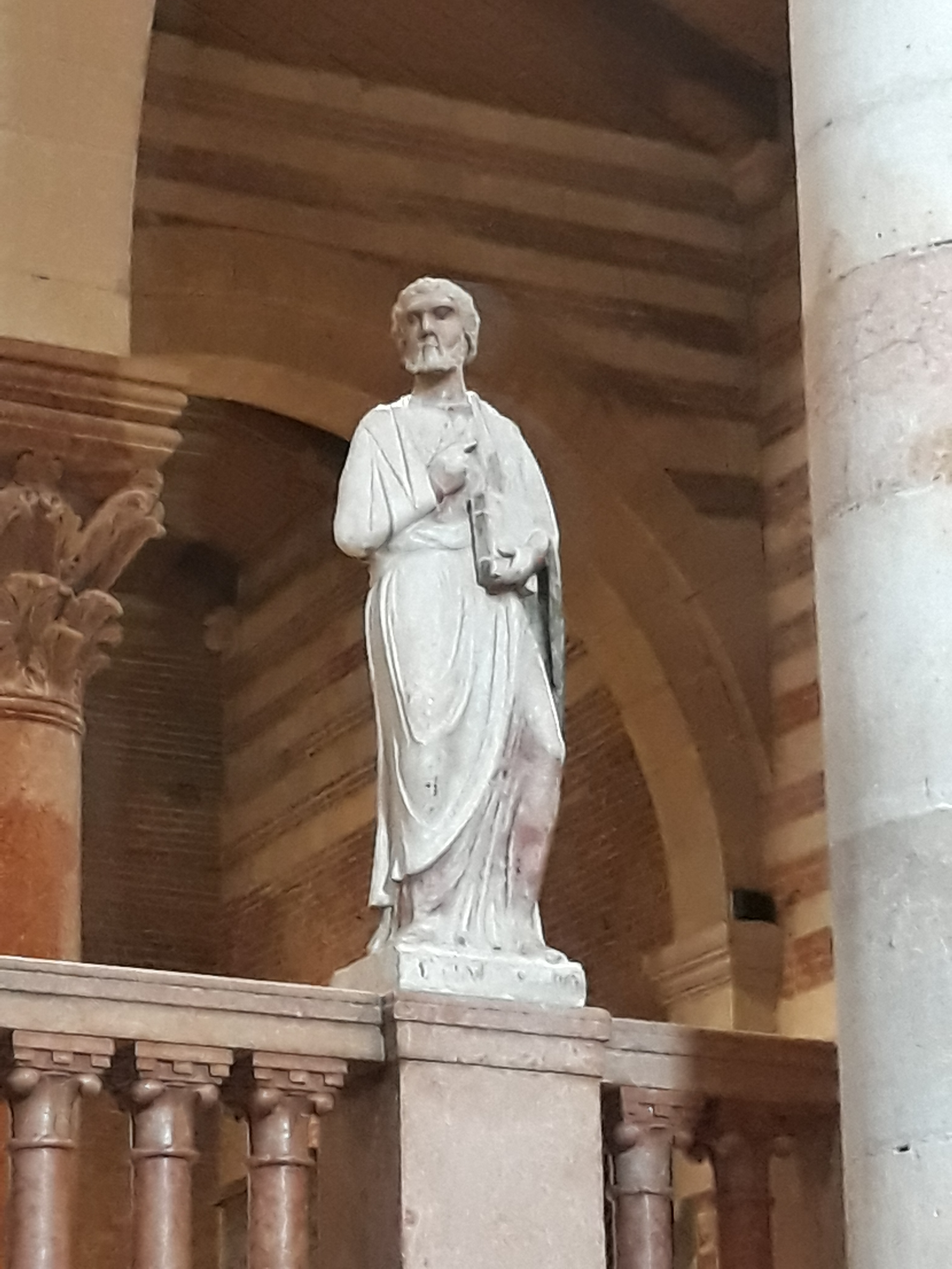 Iconostasi all'interno della basilica di San Zeno a Verona